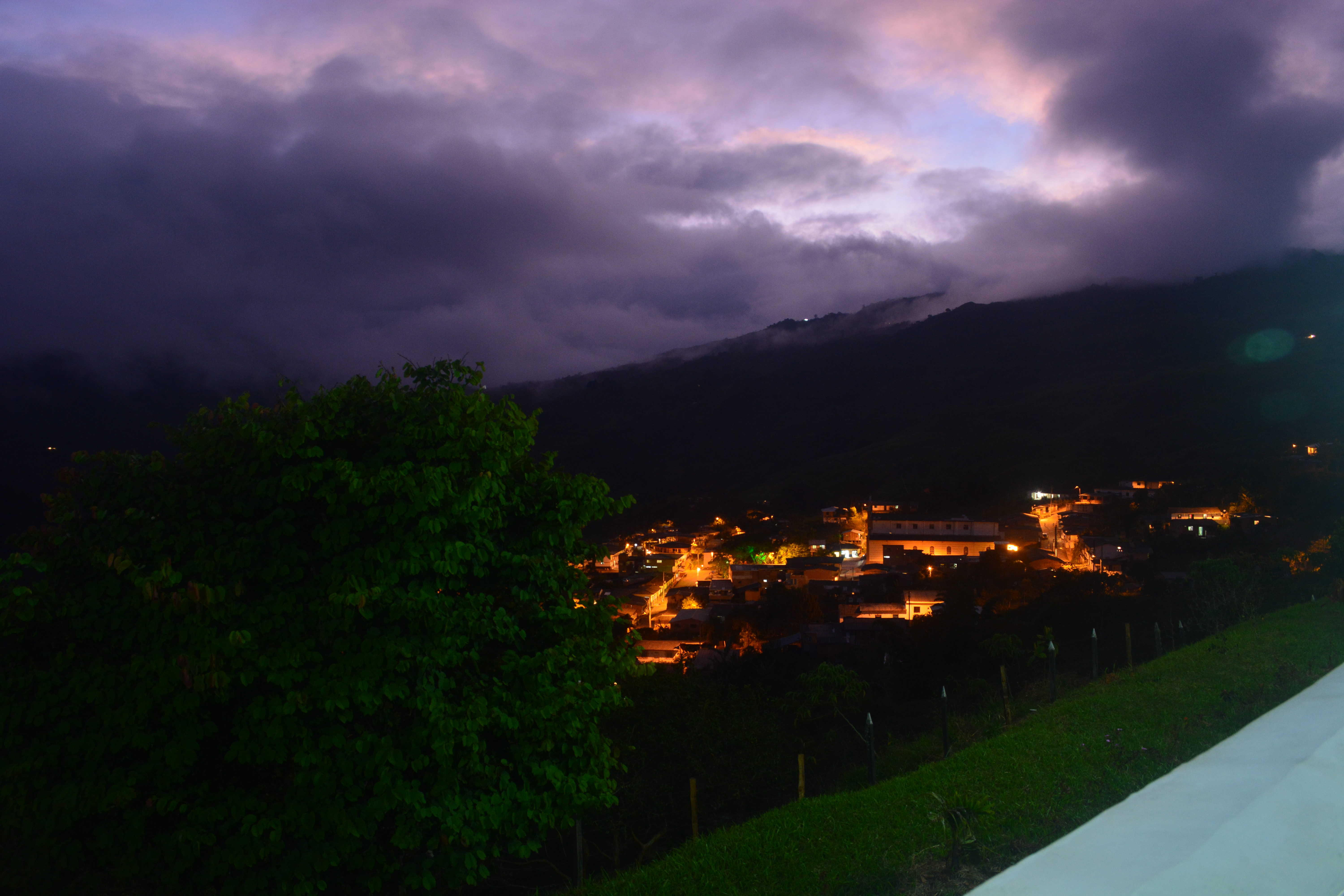 Hermoso paraje al caer la noche. Esta fotografía fue tomada en un área protegida de Colombia con el código notiene del RUNAP.